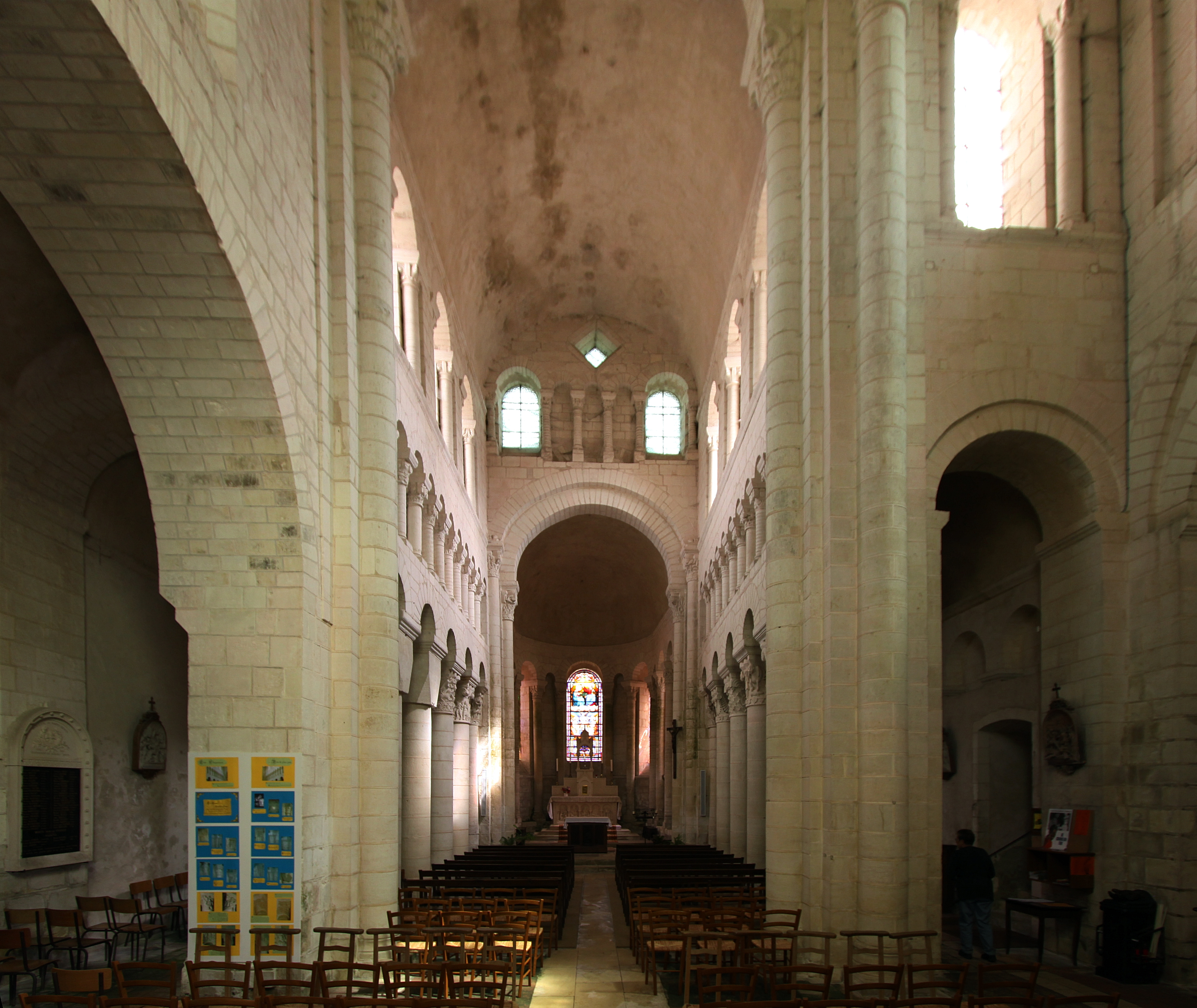 Romanische Kirche Sainte-Vierge in der französischen Ortschaft Saint-Genou im Département Indre - verbliebene Chorseite